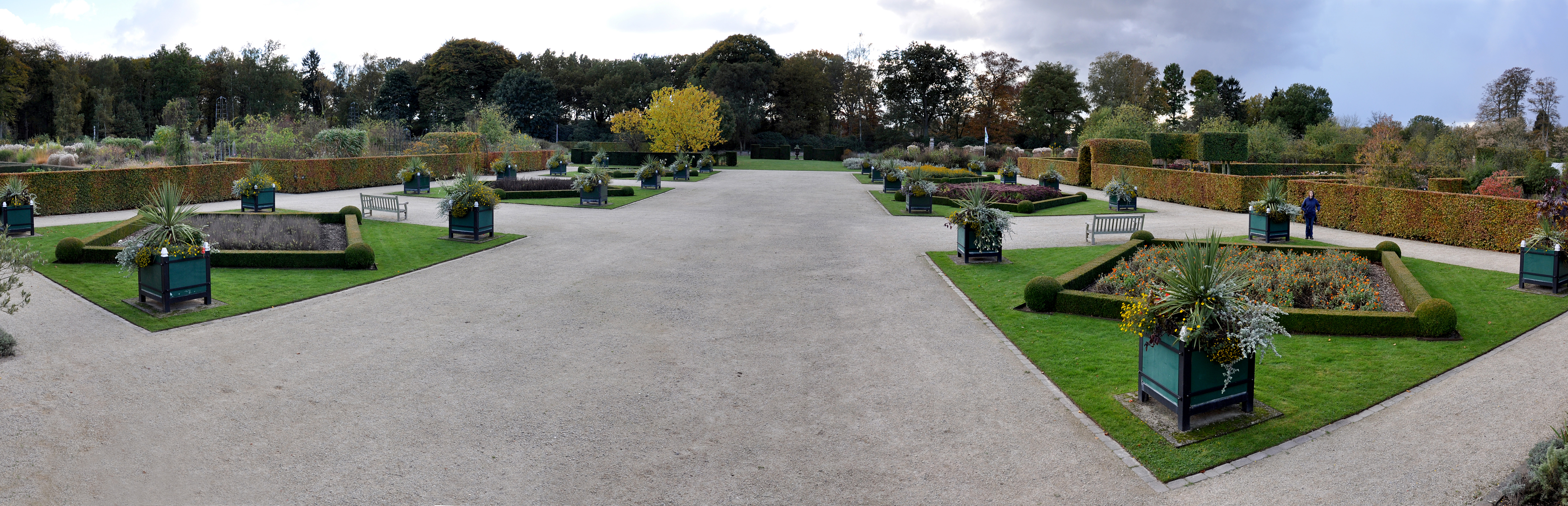 Domein Vordenstein, Schoten, Belgium